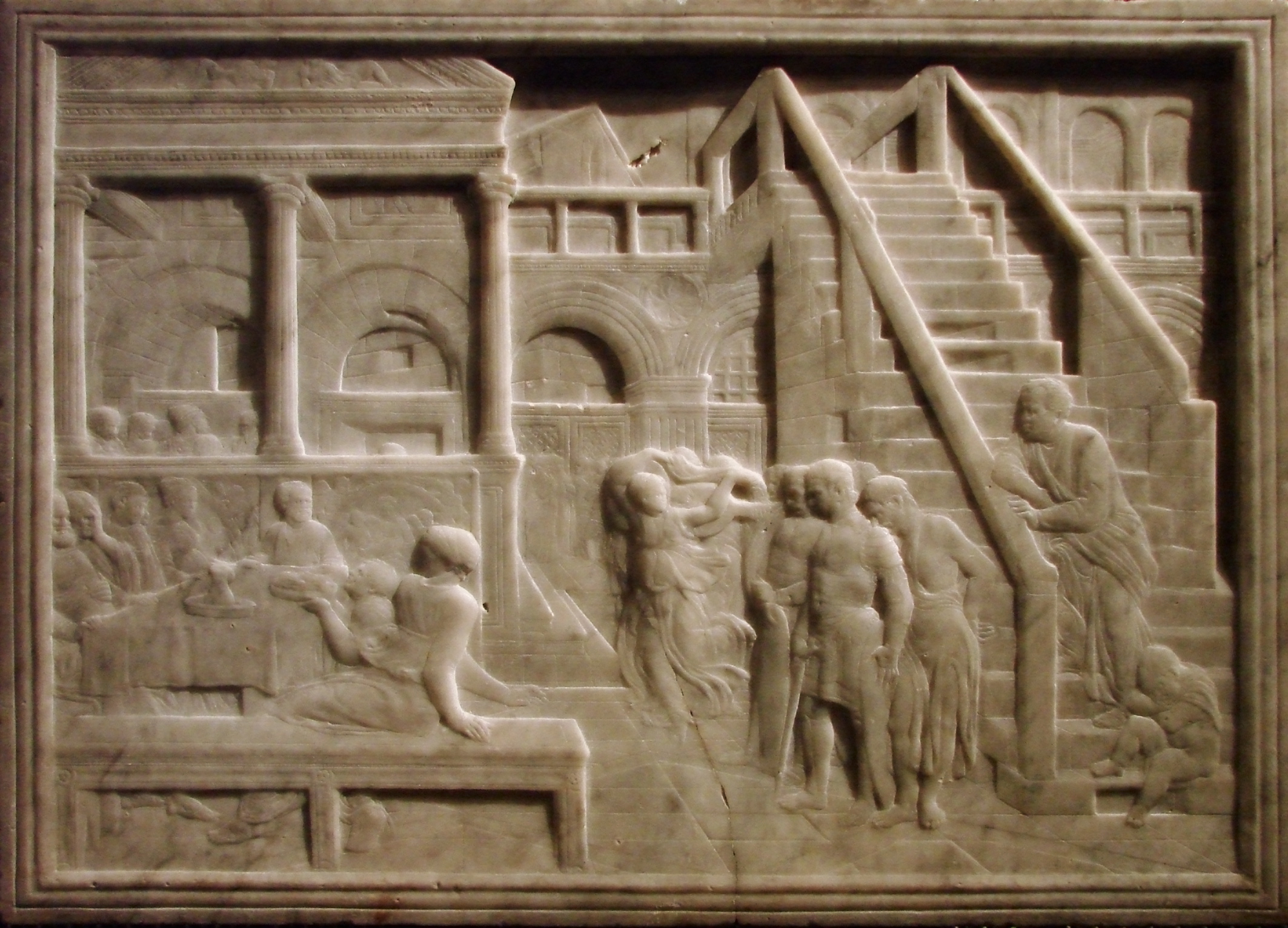 Bas-relief représentant le Festin d'Hérode, par Donatello (1386 ?-1466), marbre, vers 1435. Le bas-relief est sculpté en "relievo schiacciato", relief écrasé ou adouci, mis au point par Donatello lui-même. Musée des Beaux-Arts de Lille.